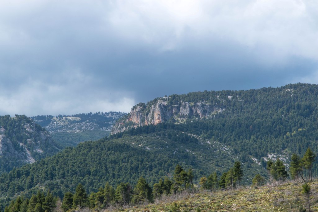 Γύρω βούνα (περίμετρος του χωριού)